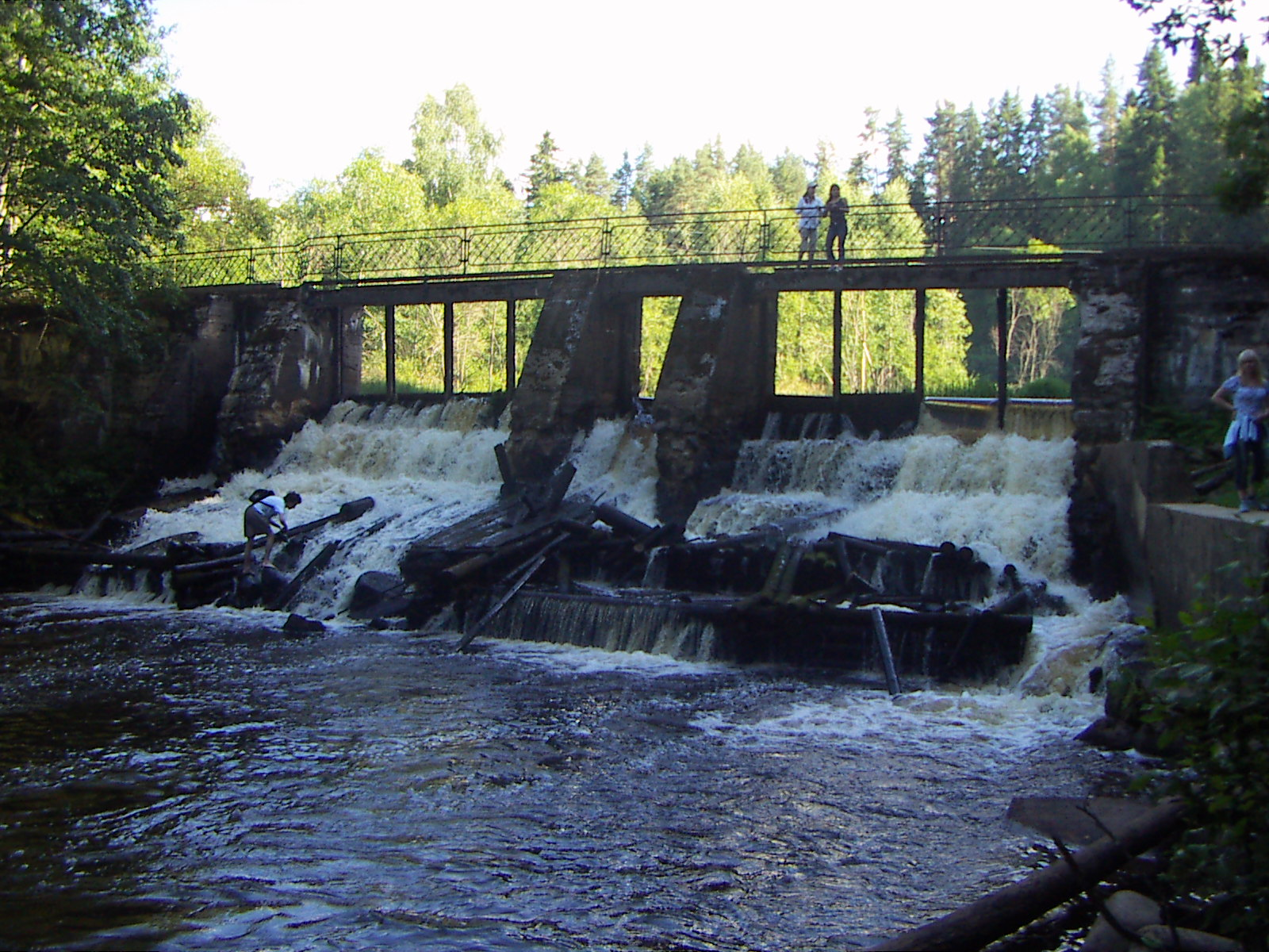 Dam at Volchaya river (Karelian Isthmus)